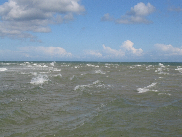 Grenen (Denemarken), waar golven van Skagerrak (links) en Kattegat (rechts) tegen elkaar botsen. Eigen werk van Sixtus. Vrijgegeven onder GFDL.